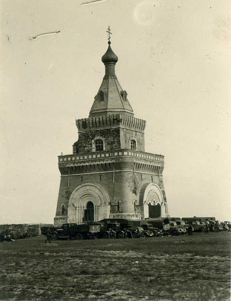 Беларуская (тарашкевіца): Лясная (Lasnaja). Капліца